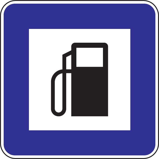 II 8a - Čerpacia stanica